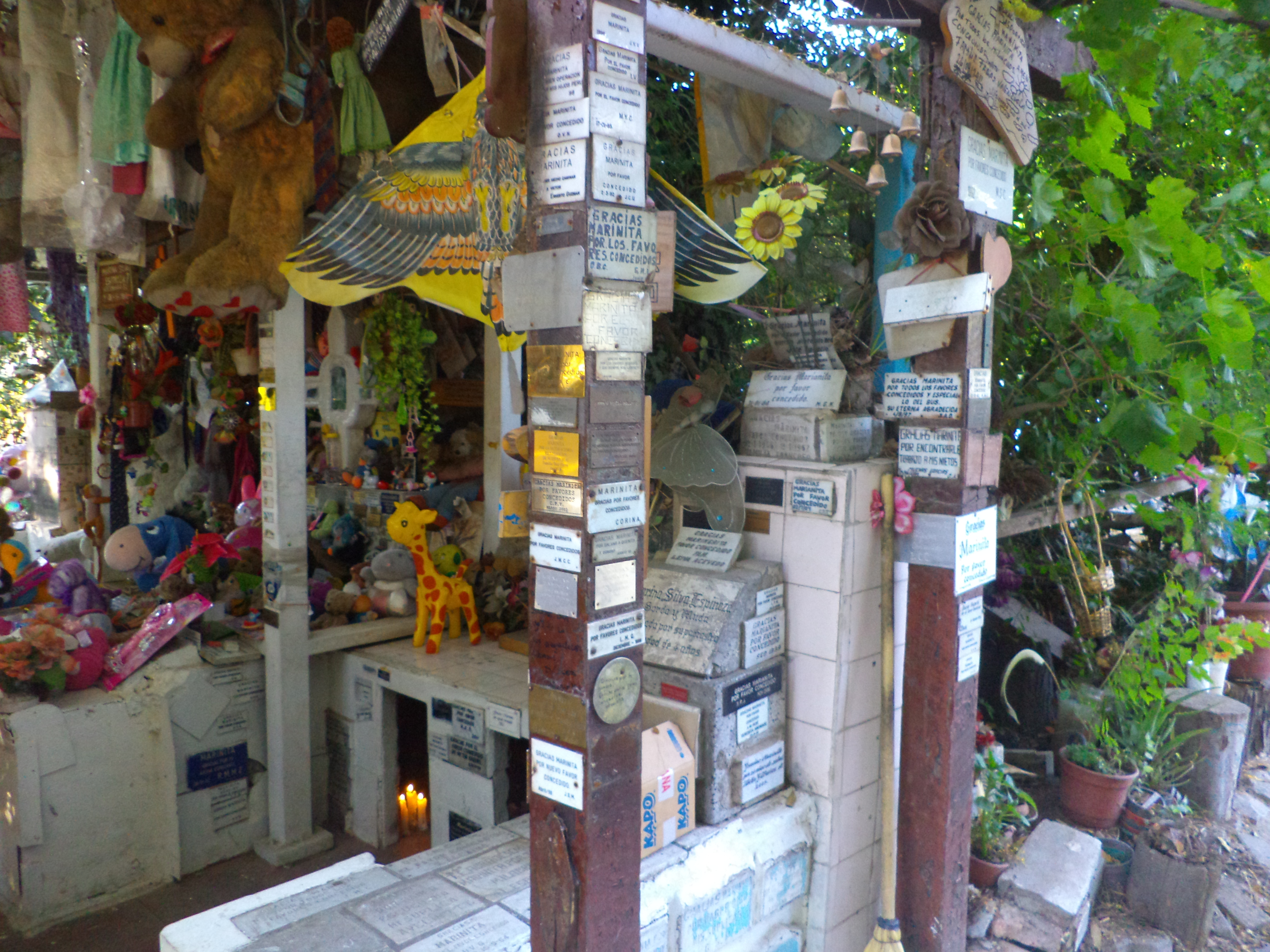 Animita o santuario para la niña Marina Silva Espinoza, asesinada bajo un àrbol del Parque O´Higgins en Santiago de Chile. Lugar de peregrinación.